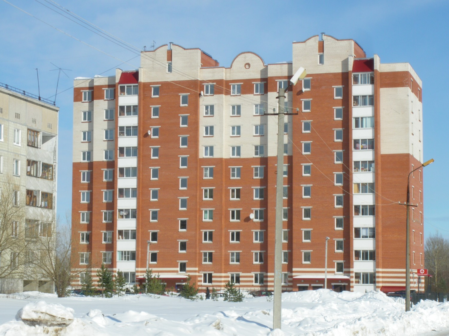 Россия, Ленинградская область, Гатчинский район, город Коммунар, Ижорская улица, дом 12. Дата съёмки - 6 марта 2010 г. Автор - Роговиков Николай.